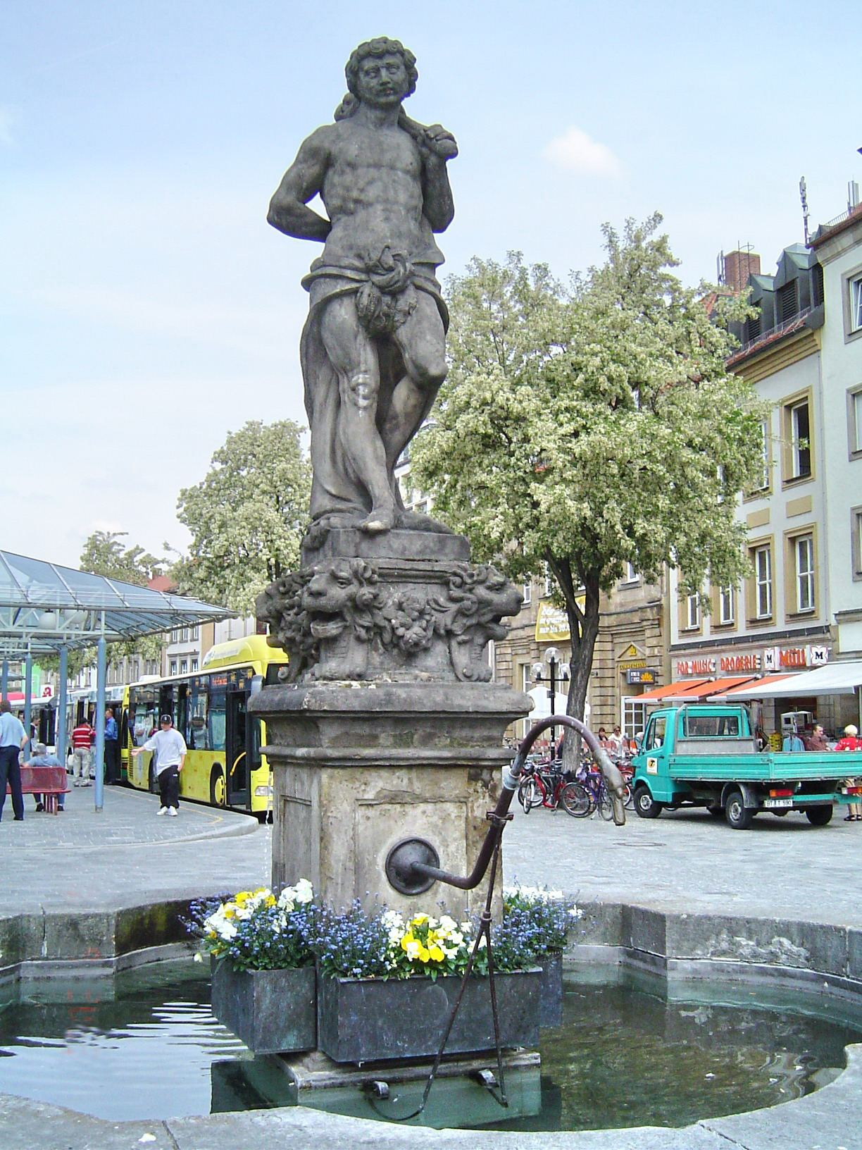 Bayreuth, Herkulesbrunnen, Maxstrasse. Elias Gedeler (1620-1693) entwarf für den Bayreuther Marktplatz 1676 den von Georg Wieshack ausgeführten Herkulesbrunnen. 1755 neue Figur von Johann Gabriel Räntz. Original-Herkules-Brunnenskulptur war seit 1926 bis 2005 im Park am Festspielhügel, nach 2005 im Historischen Museum Bayreuth ausgestellt. Kopie der Herkules-Brunnenskulptur am Marktplatz 1926 von Bildhauern Martin Mösch und Christian Weißbrod erstellt.